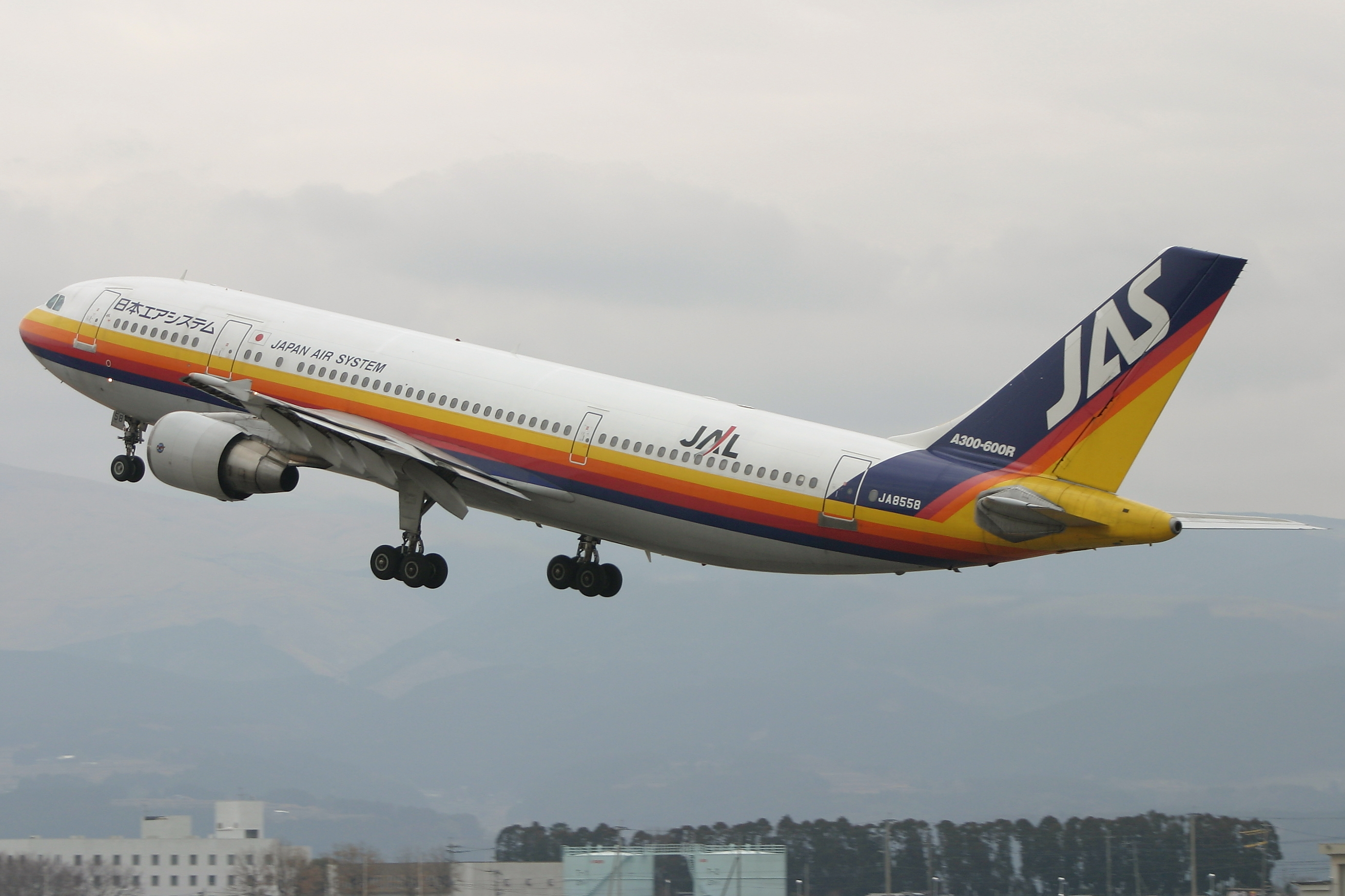 日本エアシステム エアバス A300-600R 熊本空港